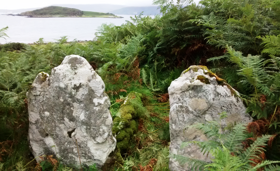 prähistorisches Ganggrab an der Südküste von Jura